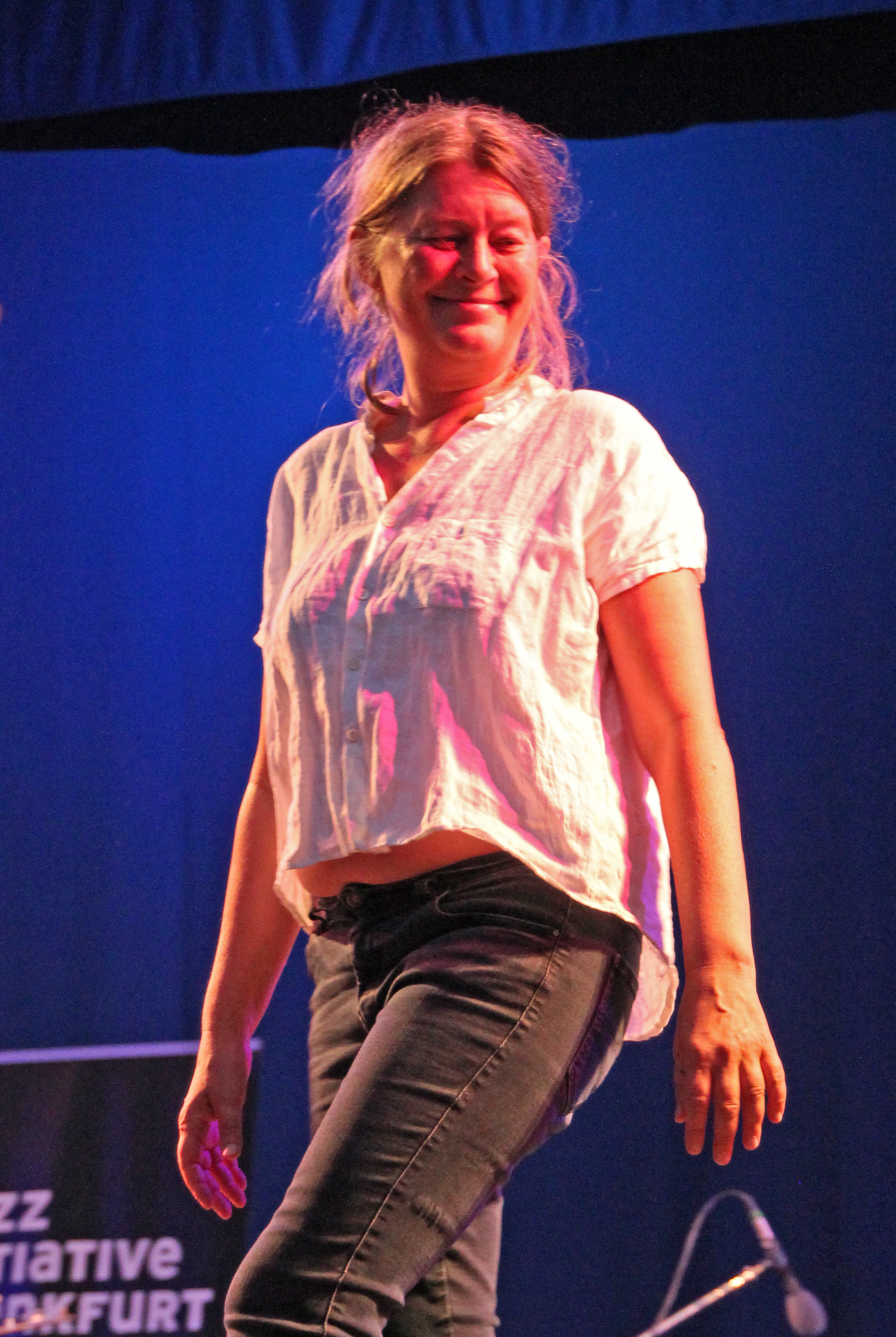 Bildinhalt: Lotte Anker bei einem Auftritt im Frankfurter Palmengarten Aufnahmeort: Frankfurt am Main, Deutschland Die dargestellte Person wurde bei einem öffentlichen Auftritt fotografiert.